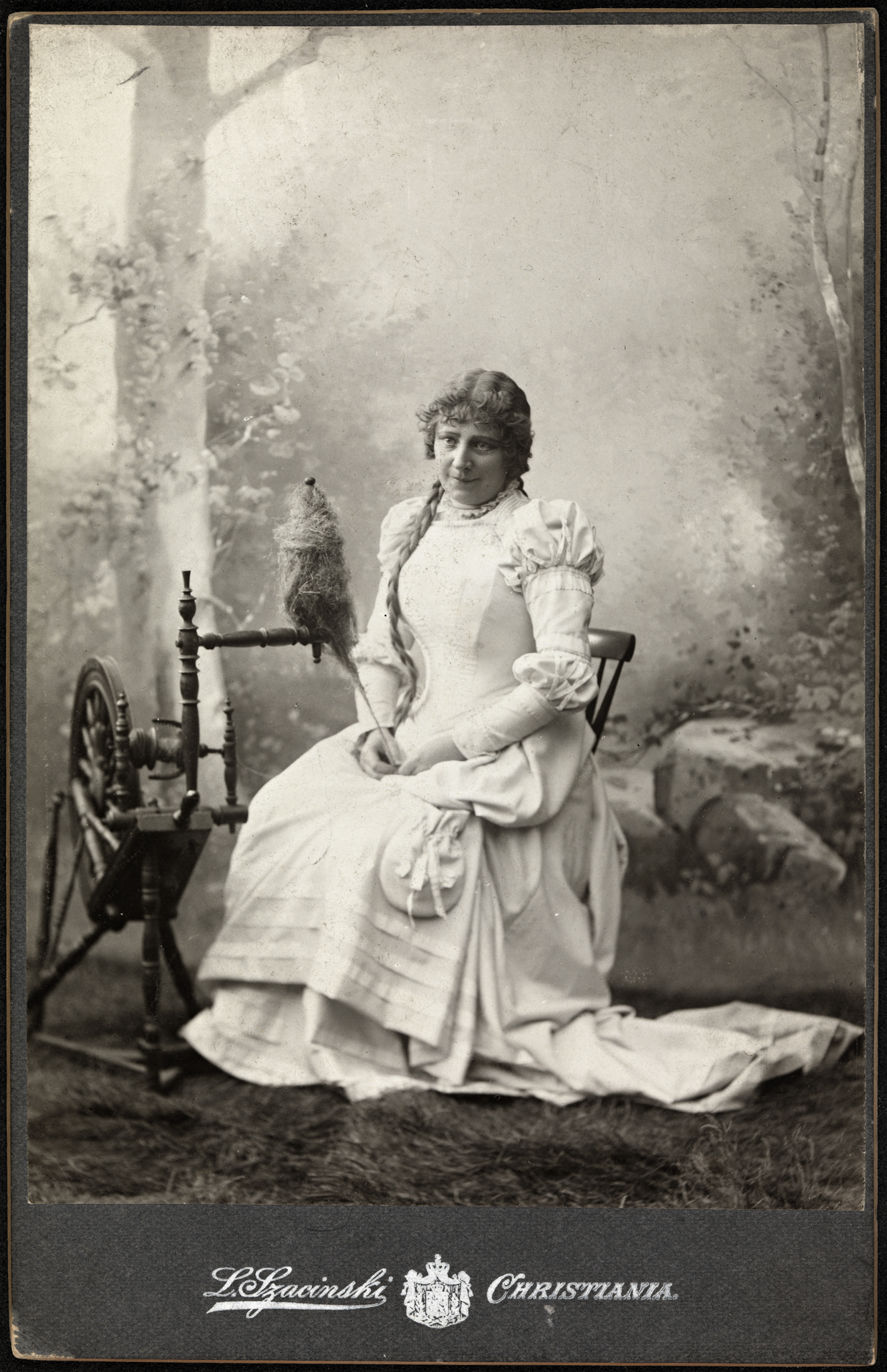 Tittel / Title: Portrett av Gina Oselio (1858-1937) som Marguerite i "Faust" Beskrivelse / Description: Kabinettkort. Gina Oselio var mezzosopran. I 1893 giftet hun seg med Bjørn Bjørnson, sønn av Bjørnstjerne Bjørnson. "Faust" er en opera i fem akter av Charles Gounod, med libretto av Jules Barbier og Michael Carré etter Goethes drama. Operaen forholder seg noe fritt til Goethes verk, og har på tyske scener alltid blitt oppført under navnet Margarethe. Dato / Date: ca 1890 Fotograf / Photographer: L. Szacinski (Christiania) Sted / Place: Oslo Eier / Owner Institution: Nasjonalbiblioteket / National Library of Norway Lenke / Link: Bildesignatur / Image Number: blds_05788